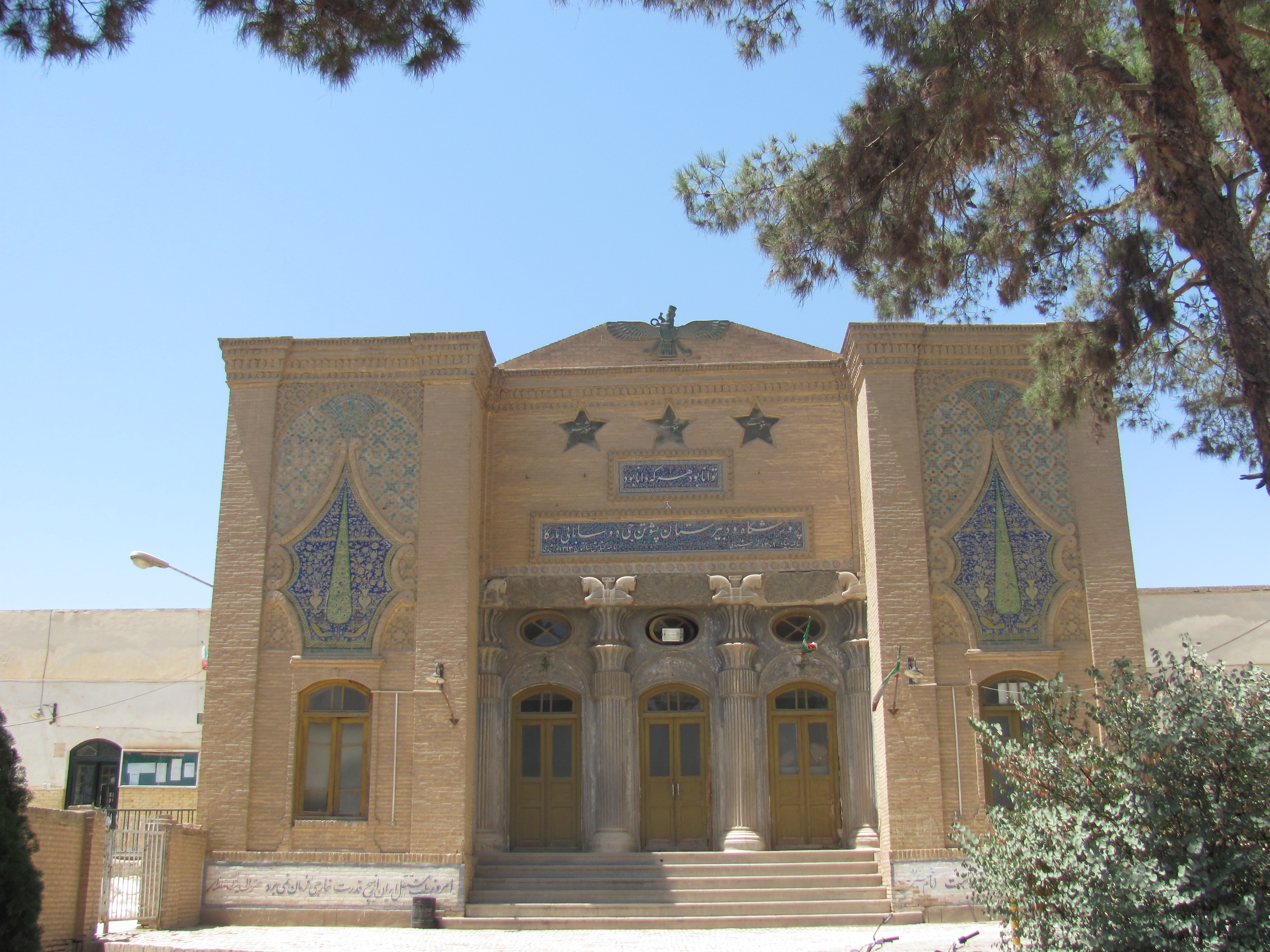 ساختمان دبیرستان پسرانه مارکار یزد، ساخته شده با سرمایه پشوتن‌جی دوسابایی مارکار در سال 1312 خورشیدی